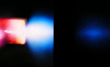 Quarzkapillaritron im Vakuum in Betrieb. Links die glühende Kapillare mit dem Plasma bis zur Extraktionselektrode und rechts dahinter der Ionenstrahl.